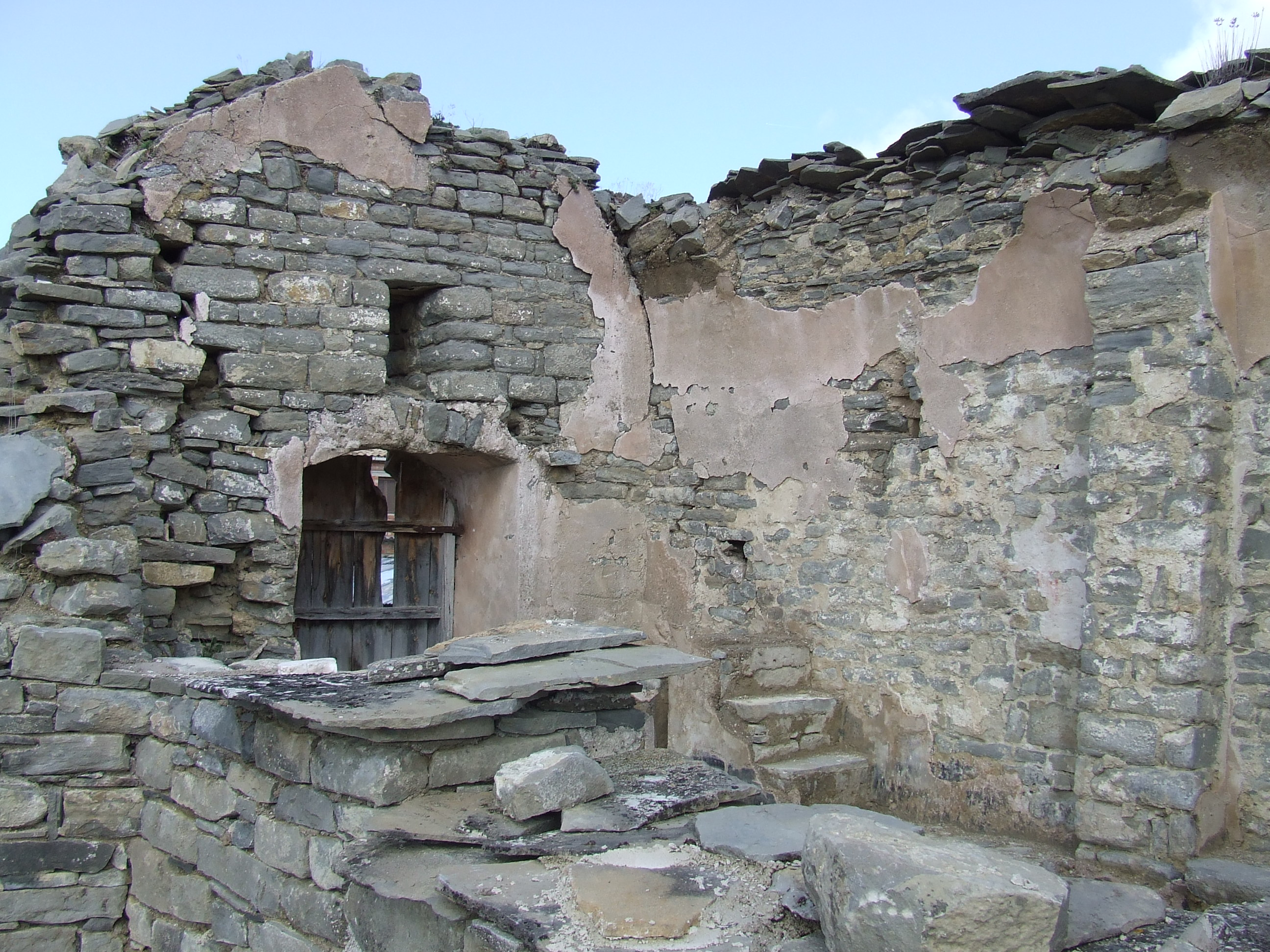 La nau, amb la volta esfondrada, de Santa Maria de la Torre d'Amargós (Sant Esteve de la Sarga, Pallars Jussà)